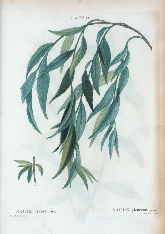 Salix Babylonica = Saule pleureur.